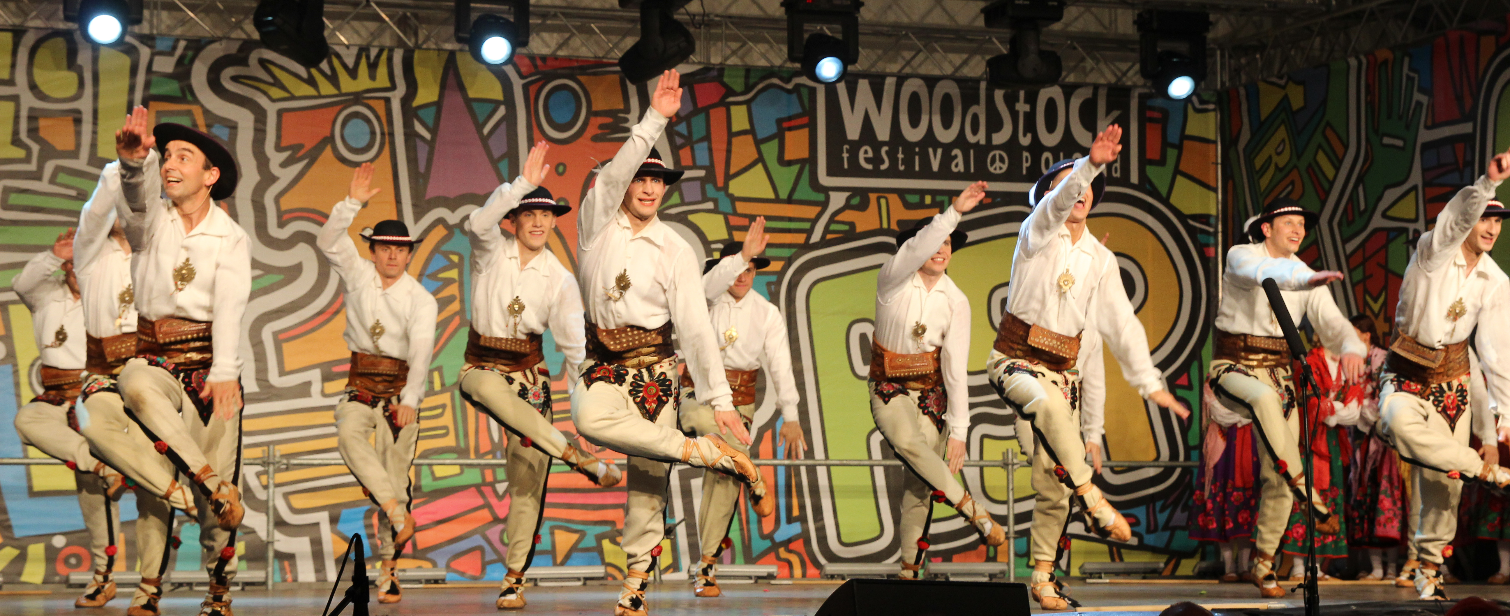 Przystanek Woodstock w 2013 r.